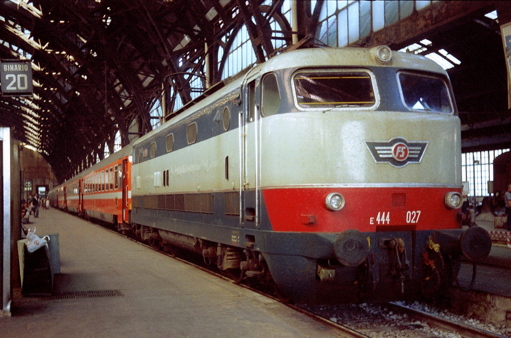 Milano Centrale. Intercity internazionale "Lemano" per Ginevra. Dopo le tre Z arancio di seconda classe, si trovavano due carrozze TEE a scompartimenti e il relativo furgone TEE.